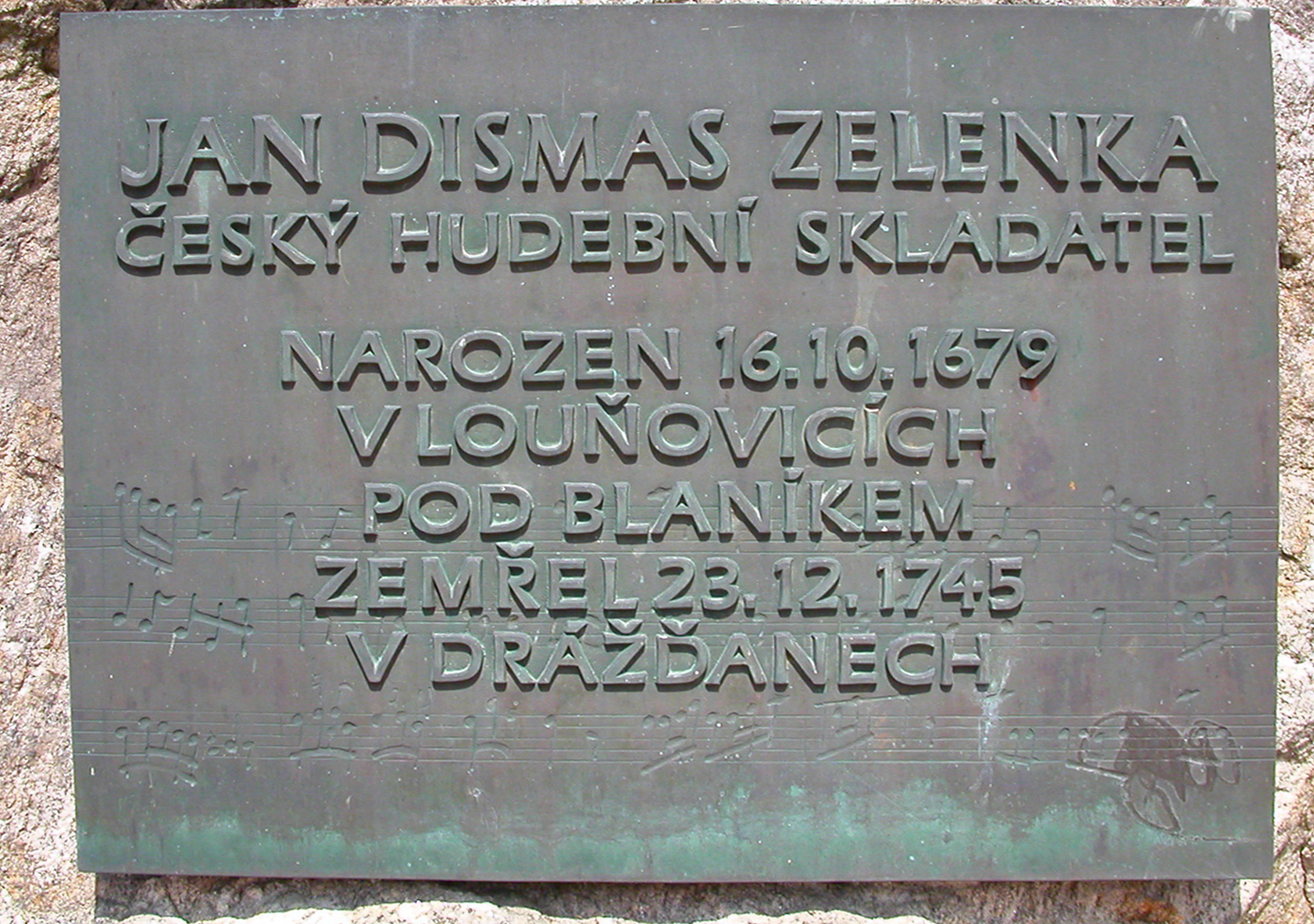 pamětní deska J.D.Zelenky vlastní foto